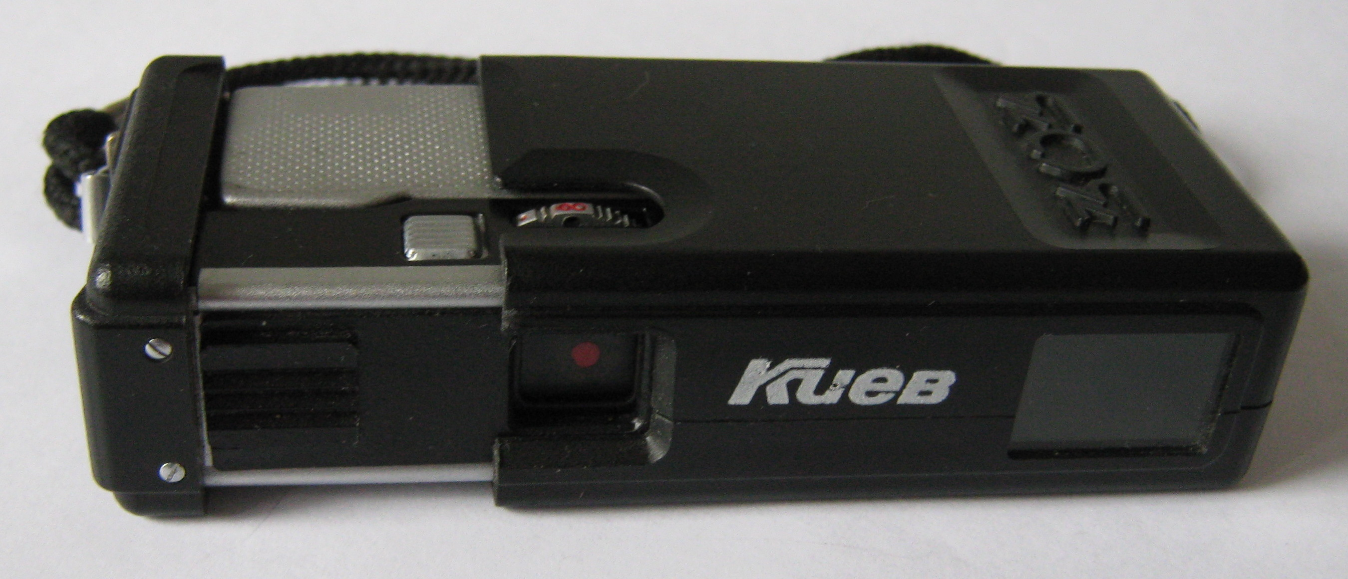 Фотоаппарат Киев-303 со взведенным затвором